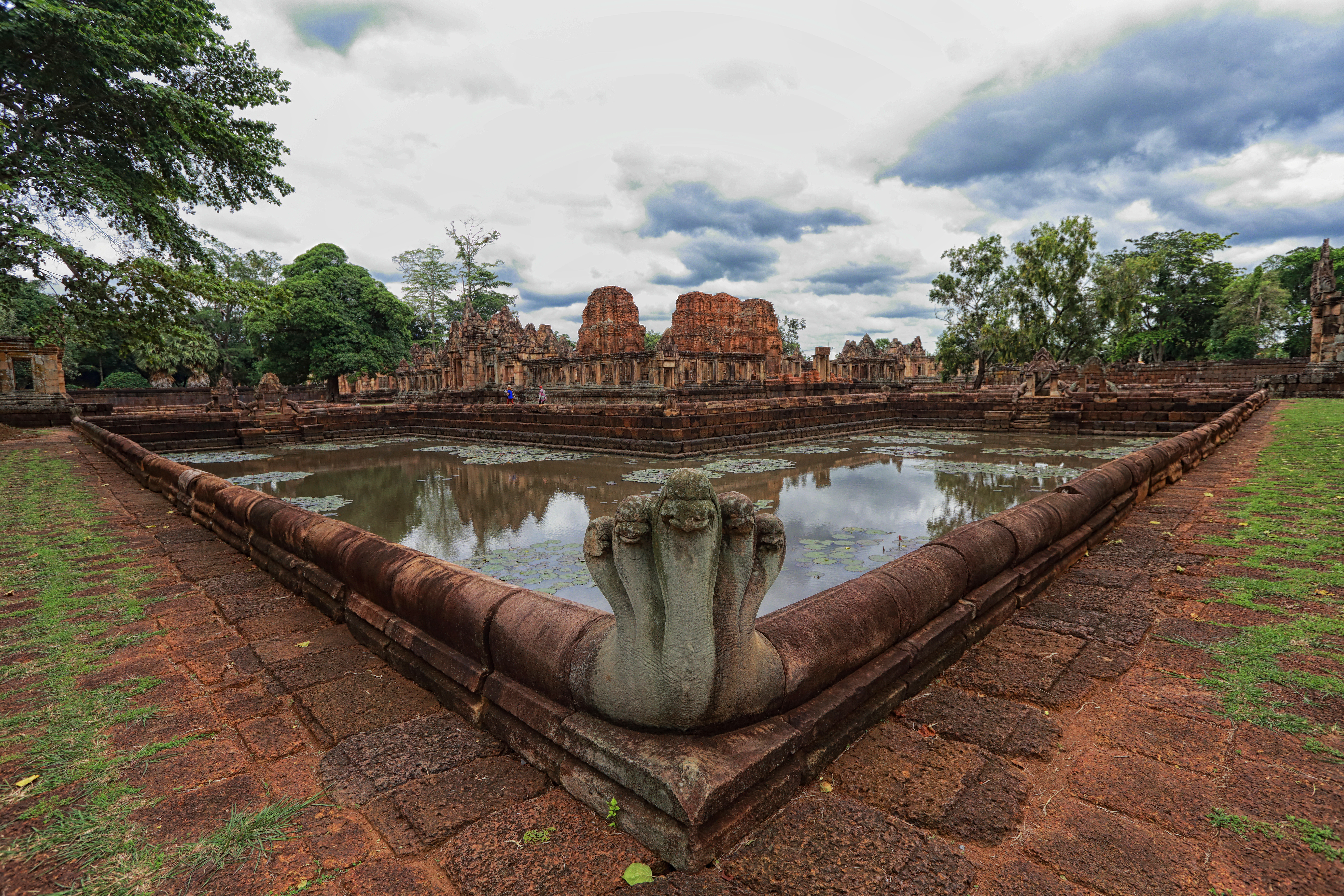 ปราสาทเมืองต่ำ เป็นหนึ่งในกลุ่มปราสาทมรรคโค เป็นศาสนสถานที่สร้างตามคติความเชื่อทางศาสนาฮินดูสันนิษฐานว่าคงสร้างขึ้น เพื่อถวายพระศิวะ มีลักษณะเป็นศาสนสถานประจำเมืองหรือประจำชุมชน ตั้งอยู่บริเวณหน้าวัดปราสาทบูรพาราม ตำบลจระเข้มาก อำเภอประโคนชัย จังหวัดบุรีรัมย์ โดยคำว่า เมืองต่ำ นี้ไม่ใช่ชื่อดั้งเดิม แต่เป็นชื่อที่ชาวพื้นเมืองเรียกโบราณสถานแห่งนี้ เพราะปราสาทแห่งนี้ตั้งอยู่บนพื้นราบ ส่วนปราสาทพนมรุ้งตั้งอยู่บนเชิงเขา ซึ่งทั้งปราสาทเมืองต่ำและปราสาทพนมรุ้งอยู่ไม่ห่างกันมาก คือห่างกันเพียง 8 กิโลเมตร มวลสารวัตถุจากโบราณสถาน และโบราณวัตถุในที่นี้ รัชกาลที่ 9 ได้ทรงนำมาเป็นส่วนประกอบในการทำพระสมเด็จจิตรลดา ปราสาทได้รับอิทธิพลศิลปะขอมแบบคลัง และแบบบาปวน มีอายุประมาณครึ่งหลังพุทธศตวรรษที่ 16